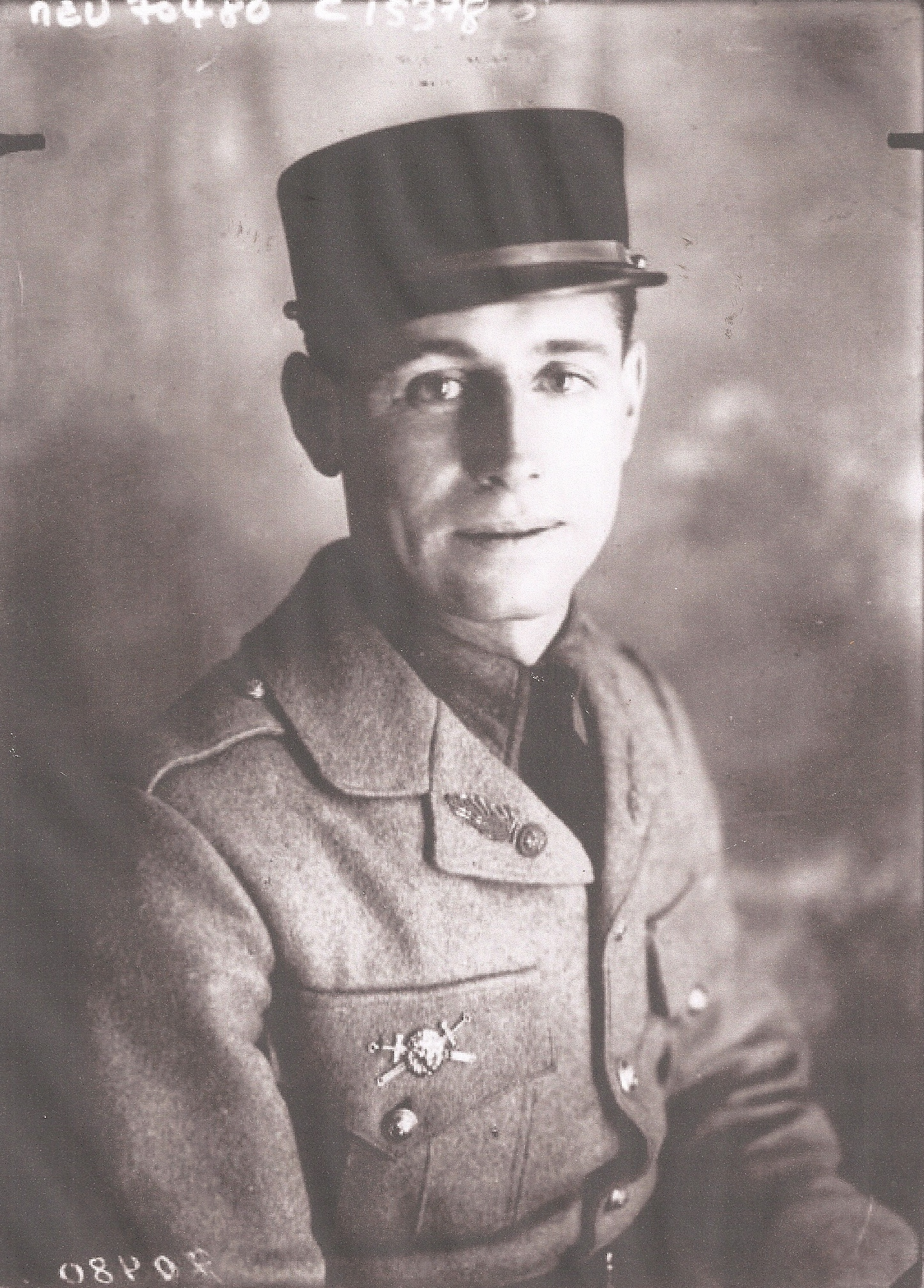 Félix Mathey, professeur d'éducation physique, champion Fédération gymnastique et sportive des patronages de France (FGSPF) d'athlétisme et directeur technique du Rayon sportif féminin (RSF).